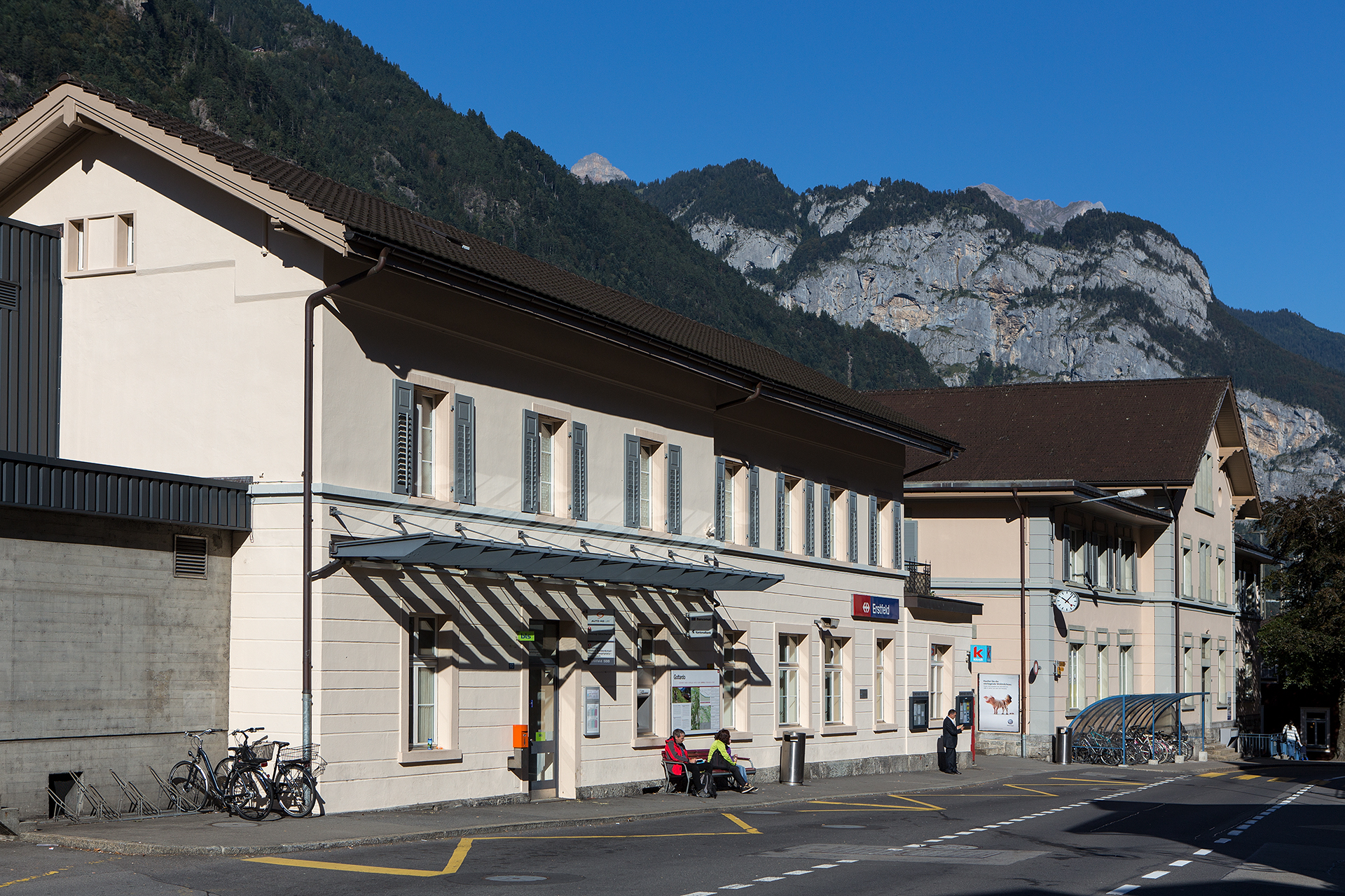 Bahnhofsgebäude in Erstfeld